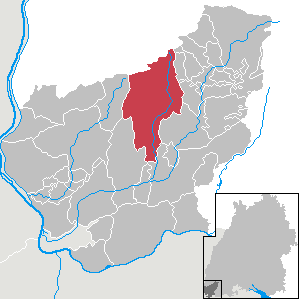 Kleines Wiesental, Landkreis Lörrach, Baden-Württemberg